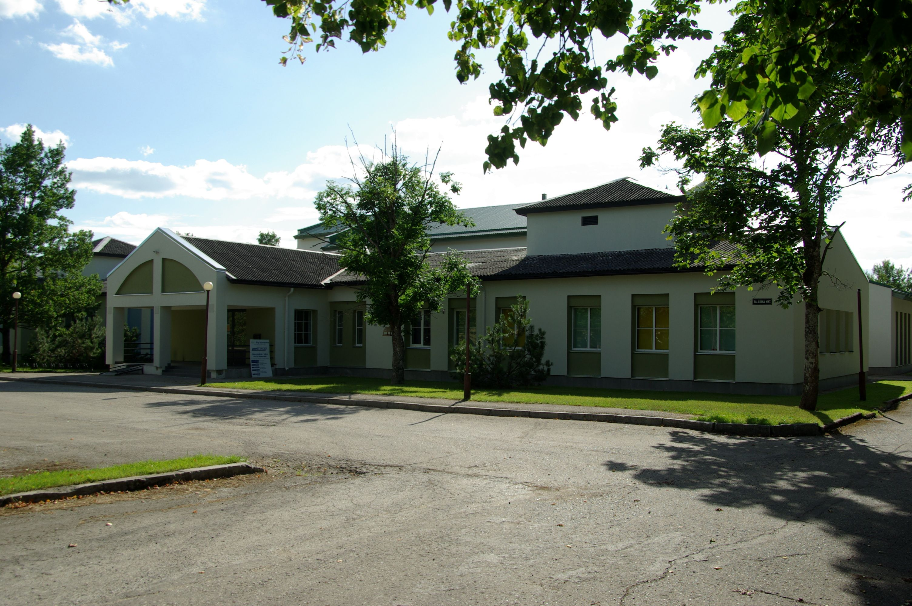 Rapla maakond, Kehtna vald